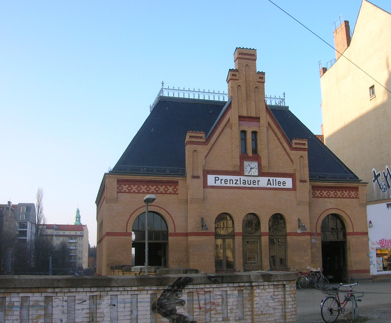 Berlin, Prenzlauer Berg, S-Bahnhof Prenzlauer Allee taken by Mazbln on January 15, 2006